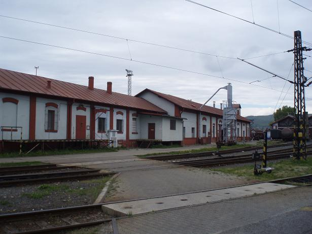 Východné (Rendez), železnica